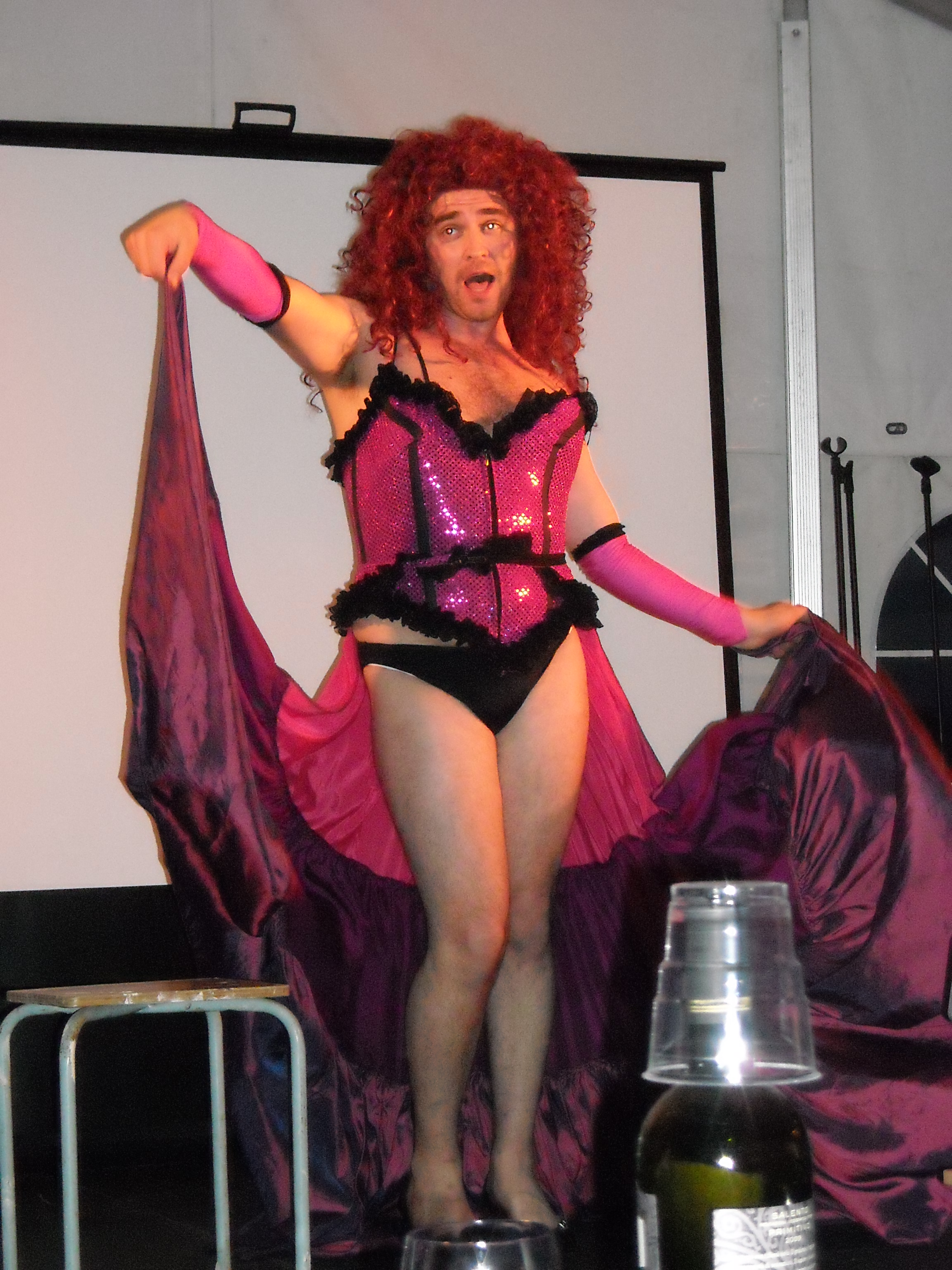 Morten Bergheim i Arendal 2010